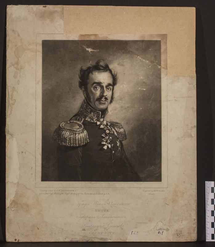 Портрет Витте Ивана Осиповича